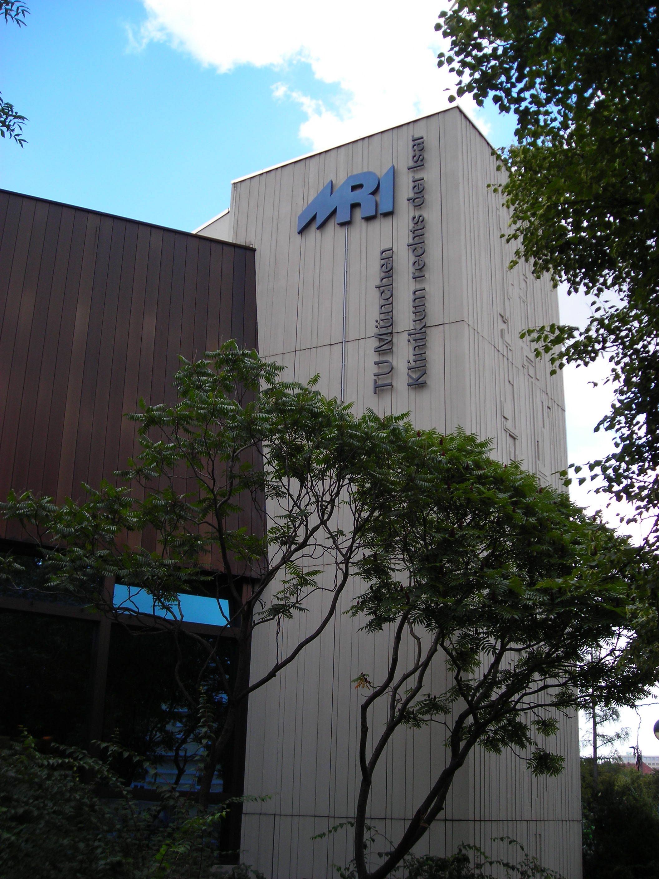 Klinikum rechts der Isar in Munich, Germany